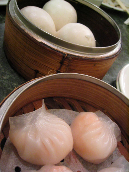 Dim sum at Shui Wah in Chicago.